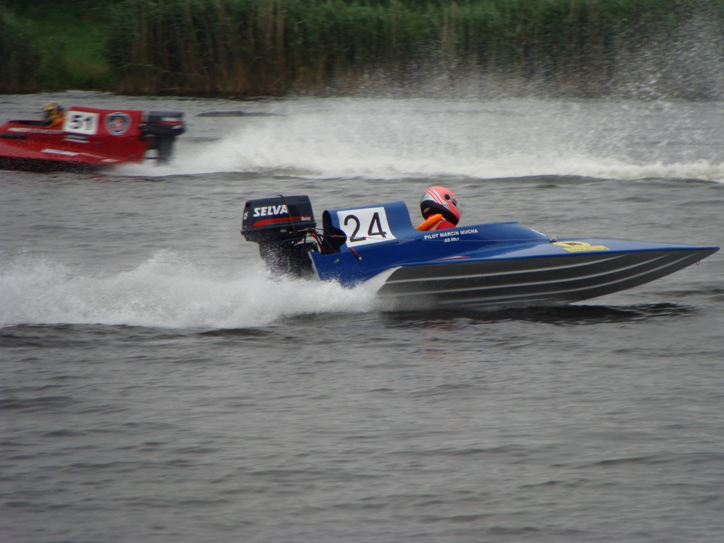 Śrem, Motorowodne Mistrzostwa Świata w klasie O-700, pojazd Marcina Muchy, klasa T-400.